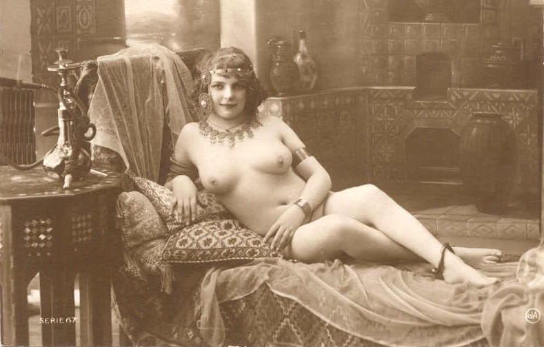 Fernande